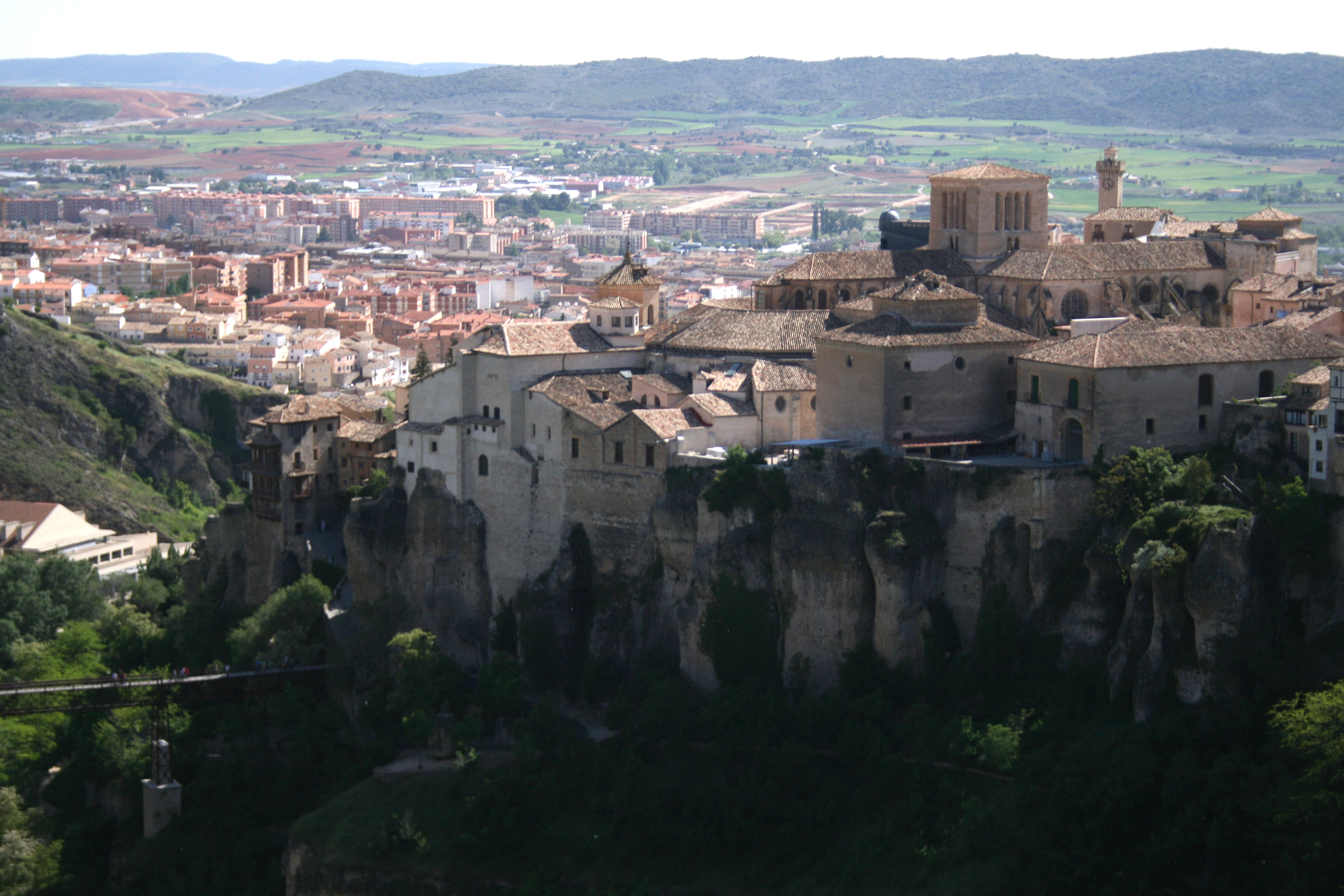 Vista de Cuenca